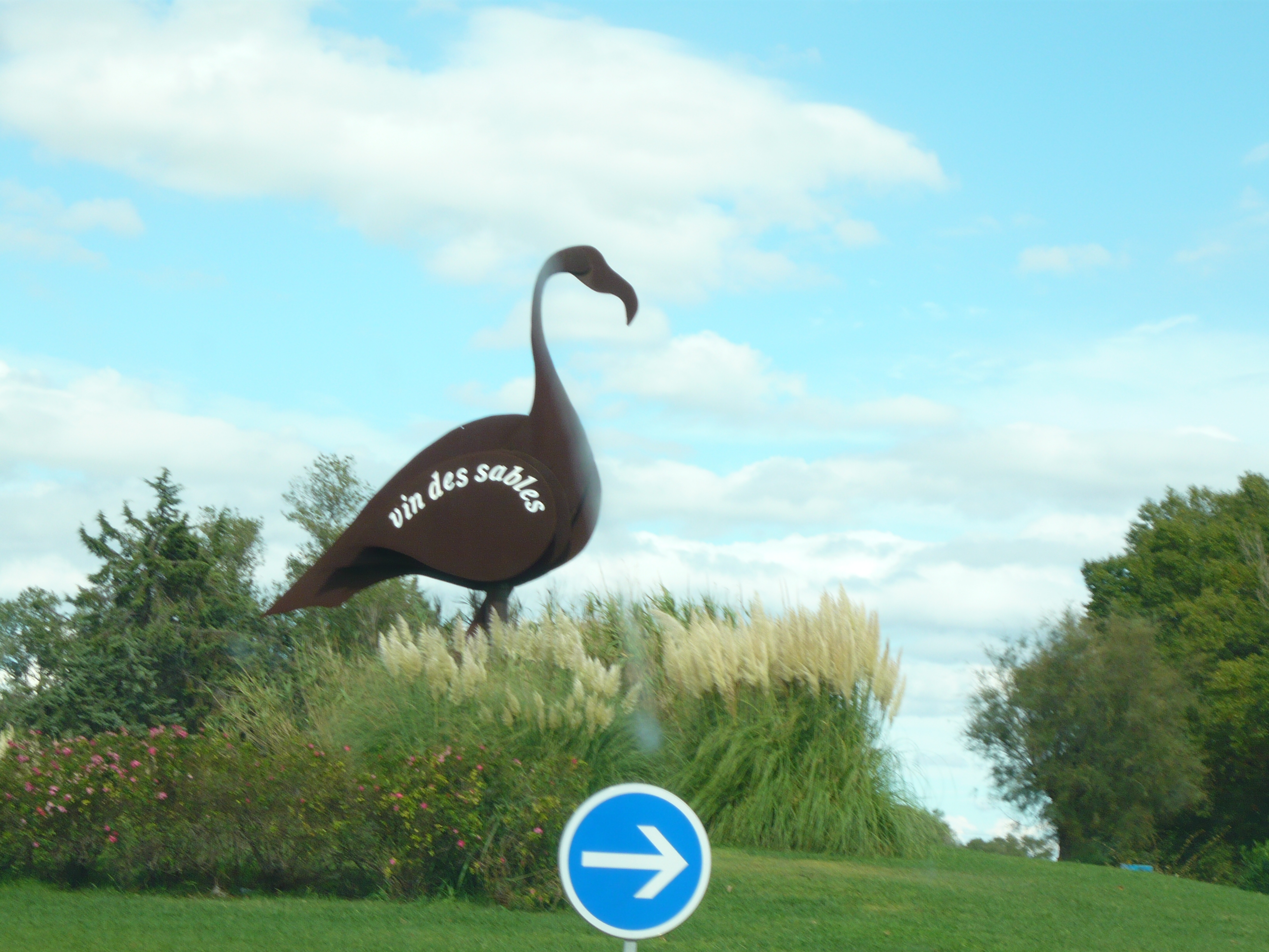 Flamant rose géant au rond-point D62-D718 à Aigues-Mortes